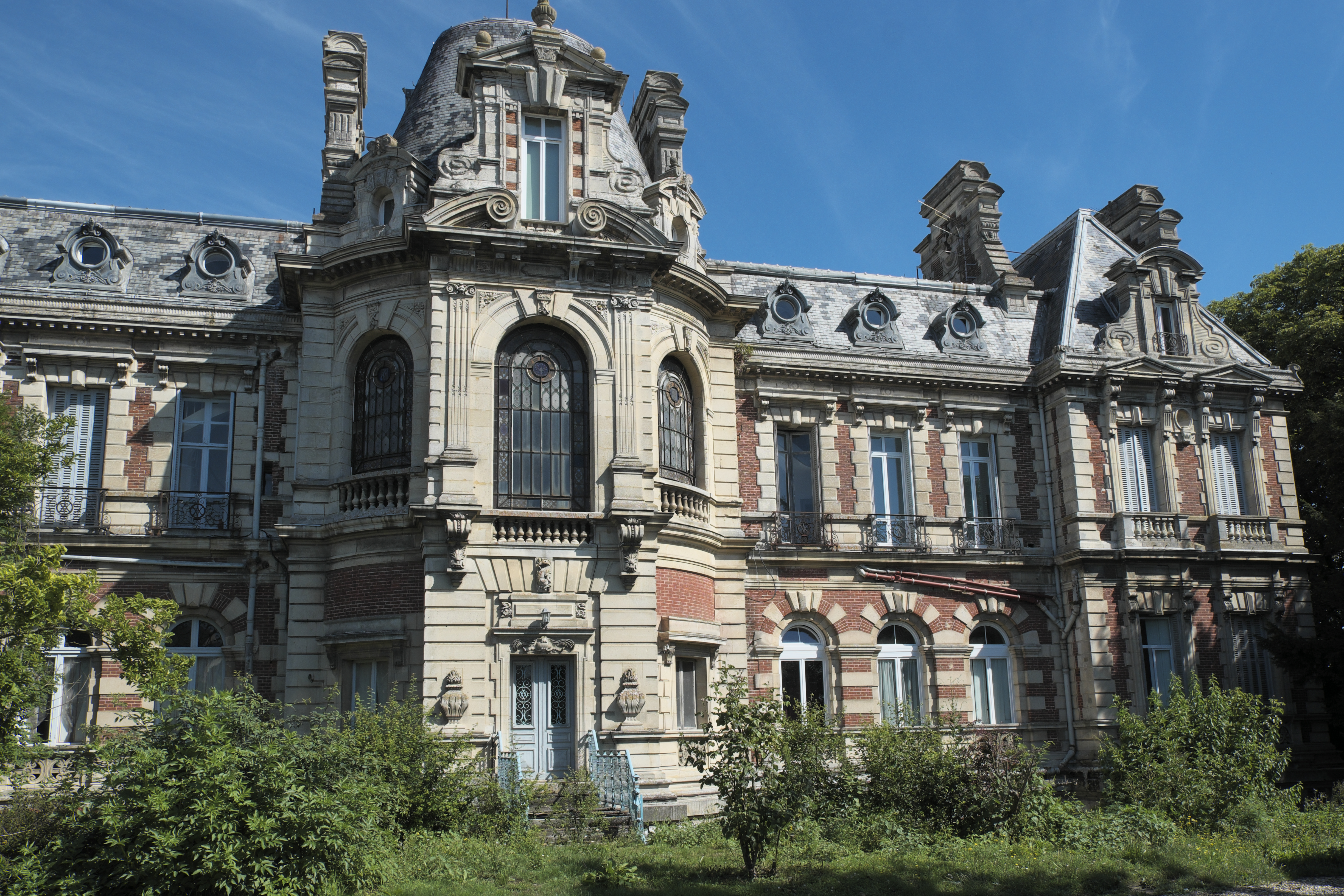 Schloss in Compans im Département Seine-et-Marne (Île-de-France/Frankreich)